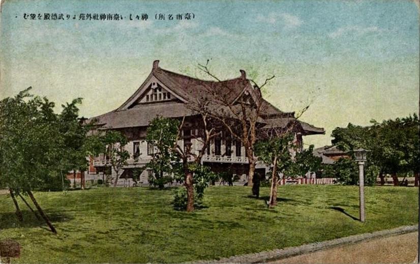 從臺南神社外苑看的臺南武德殿